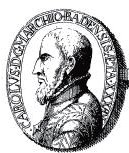 Markgraf Karl II. von Baden-Durlach - Kupferstich einer Münze